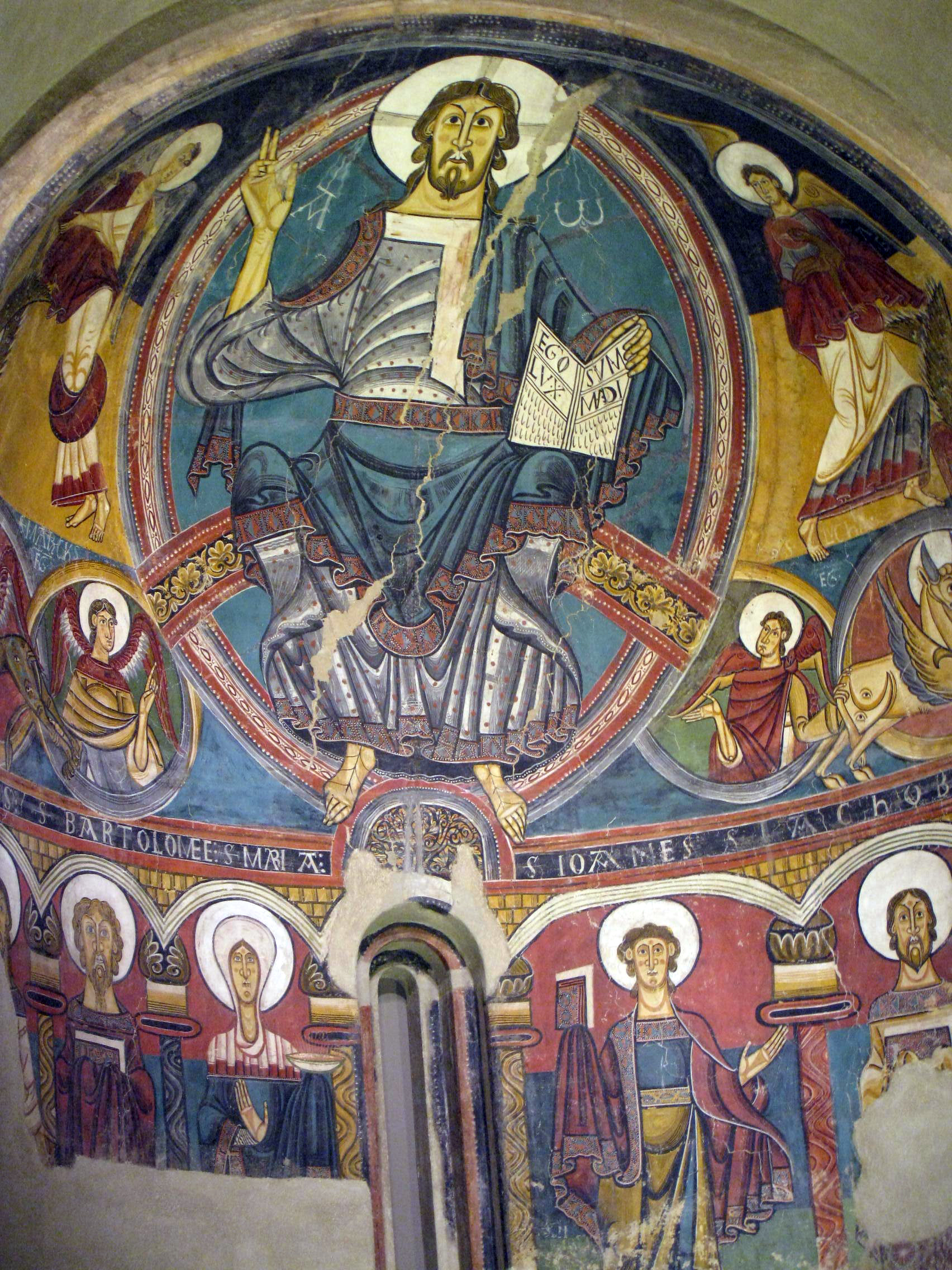 Palau Nacional (Barcelona)